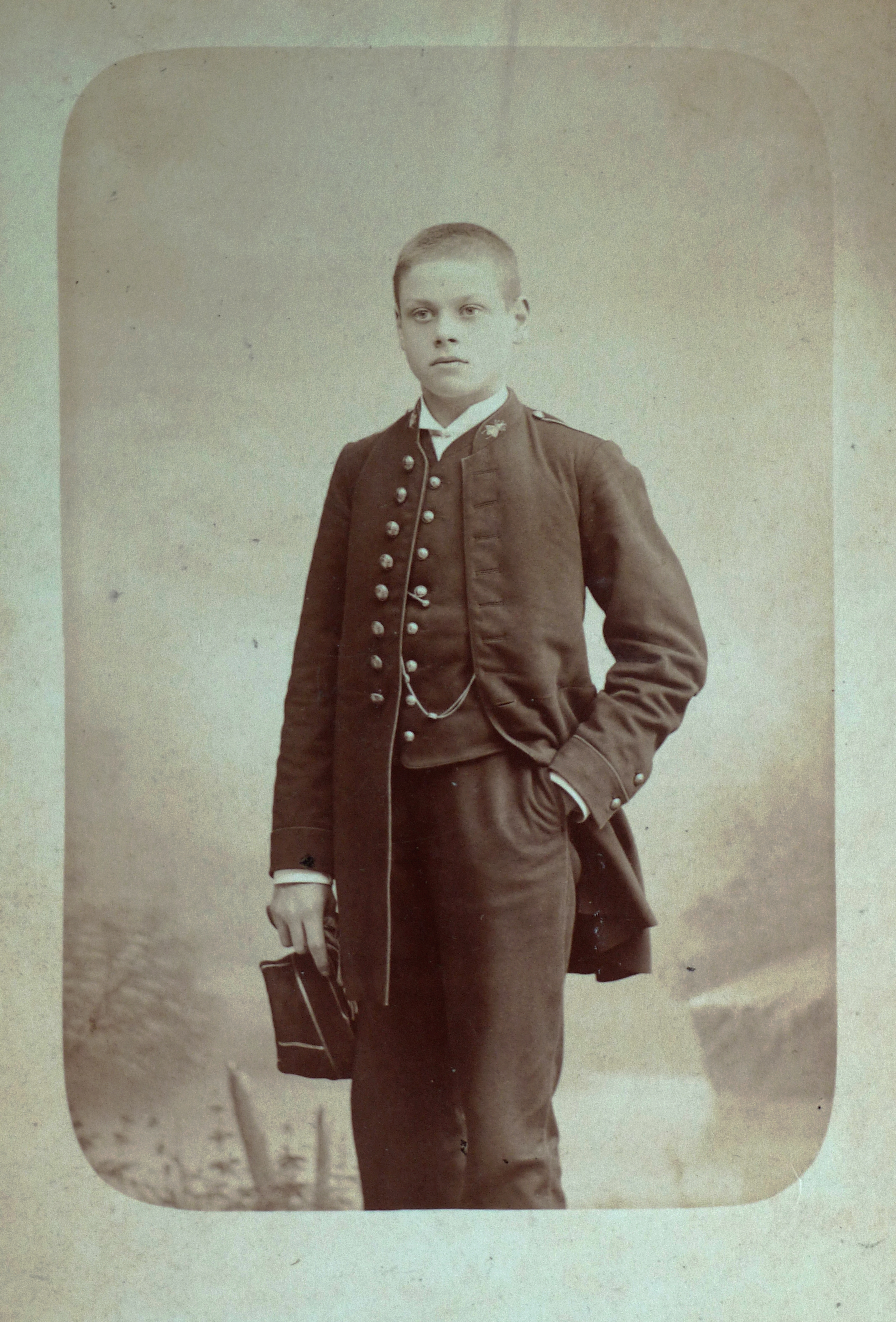 Photo d'un élève anonyme en uniforme de l'école Centrale de Paris, vers 1890. Photo au format cabinet (9,5 x 14,5 cm) sur carton du photographe Mayer, 67 rue des Batignoles, Paris.